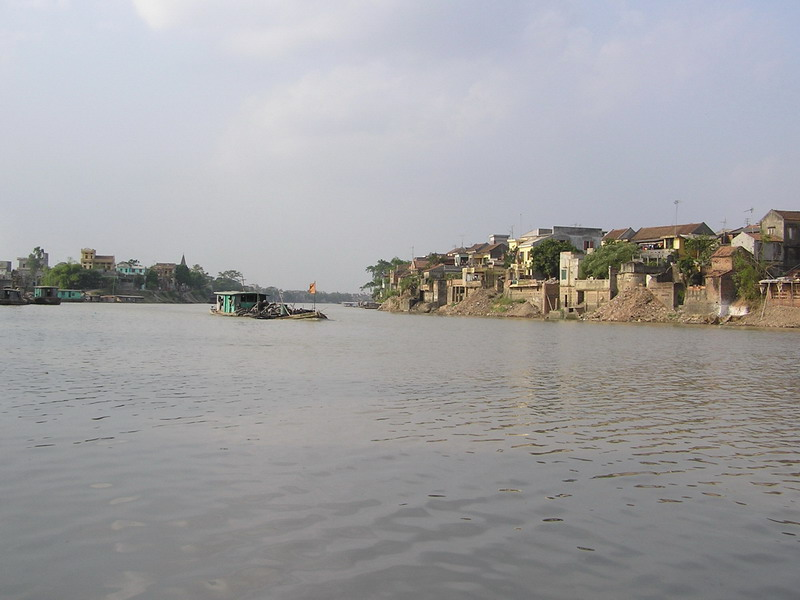 Sông Cầu đoạn chảy qua ranh giới hai huyện Việt Yên (tỉnh Bắc Giang) và Yên Dũng (tỉnh Bắc Ninh) thuộc địa phận các làng Thổ Hà và Nguyệt Hà.